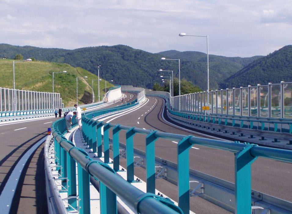 banska bystrica